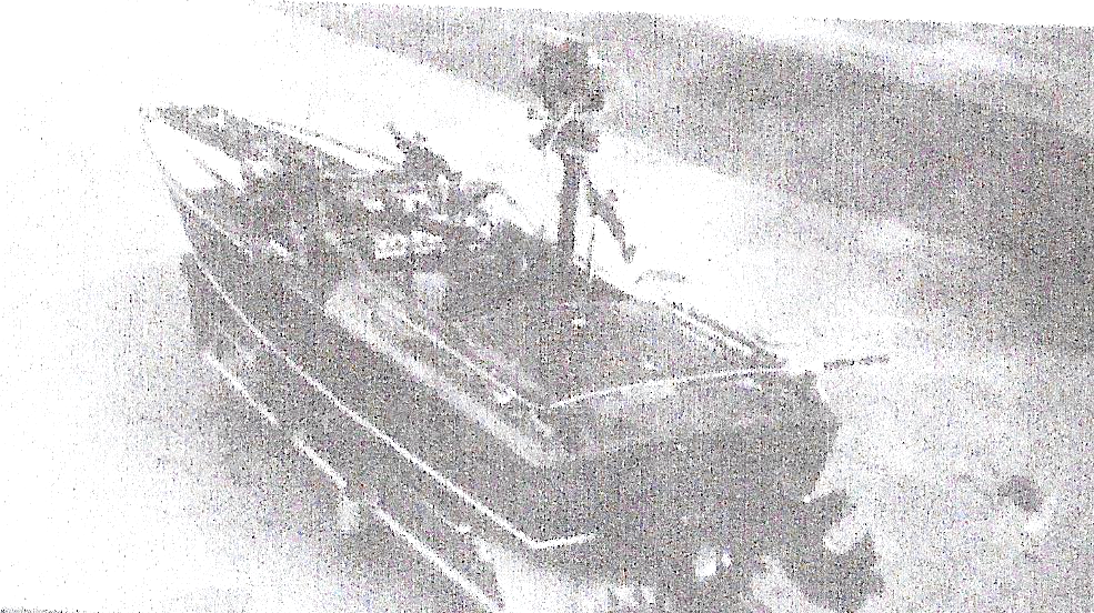 סירת סנונית חמושה